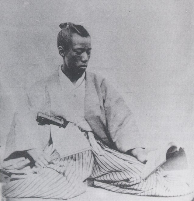 平野長裕 Hirano Nagahiro.